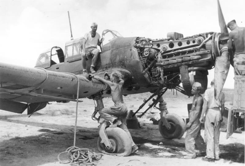 Tmimi - Demontieren einer deutschen Maschine